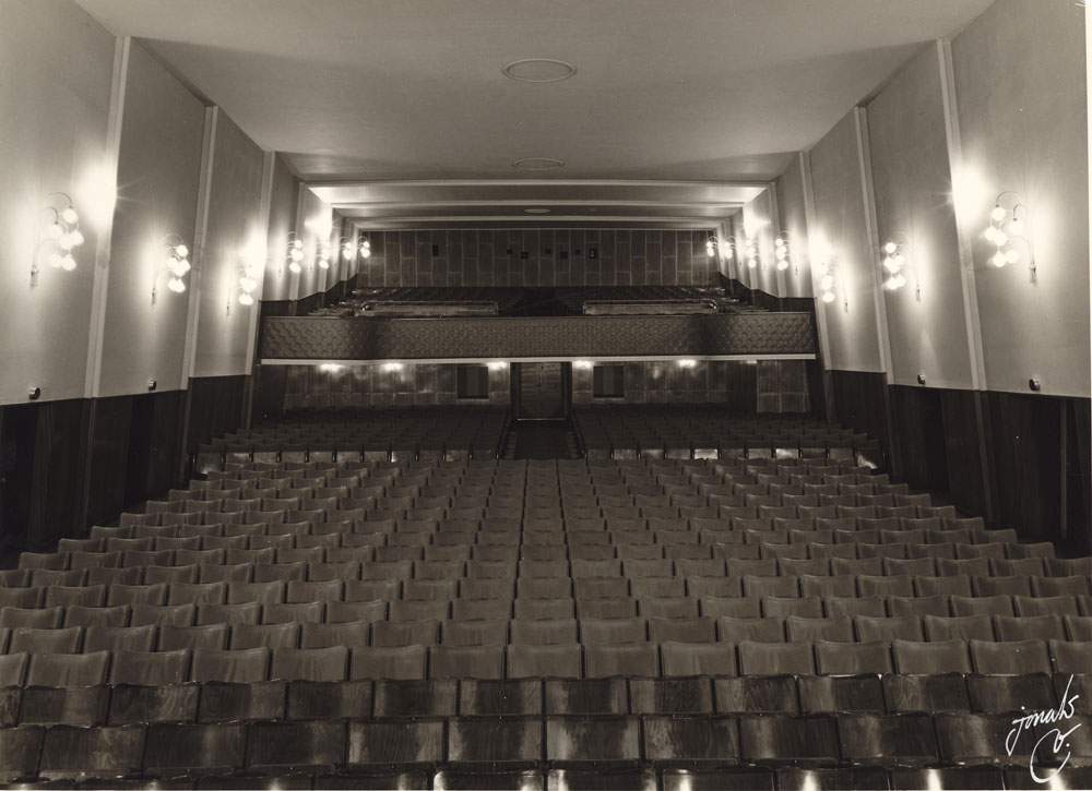 Colosseum interior 1950s